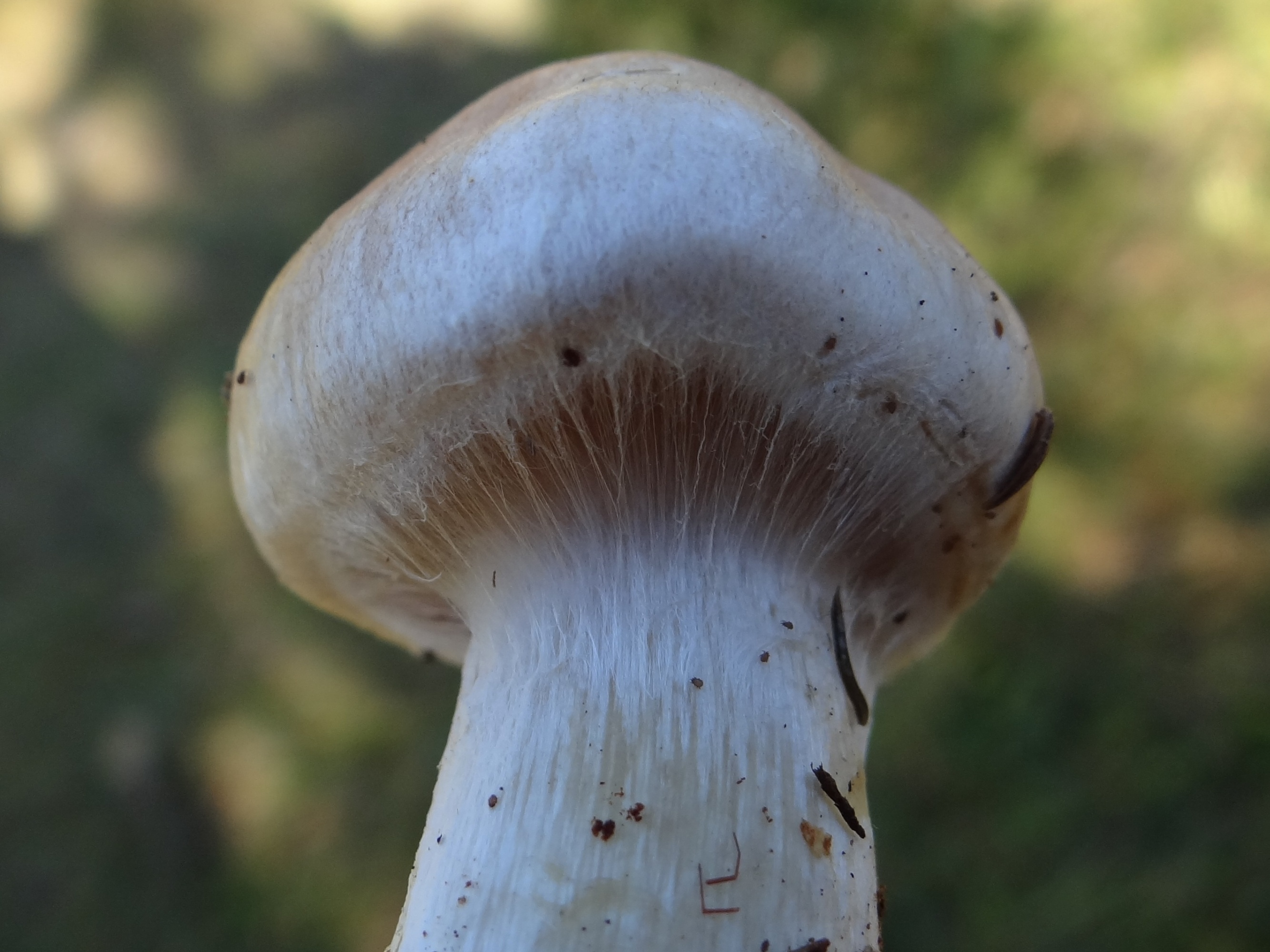 Cortinarius cinnamoviolaceus. Habitat:Tatra Mountains (Slovakia, Dolina Kieżmarska)